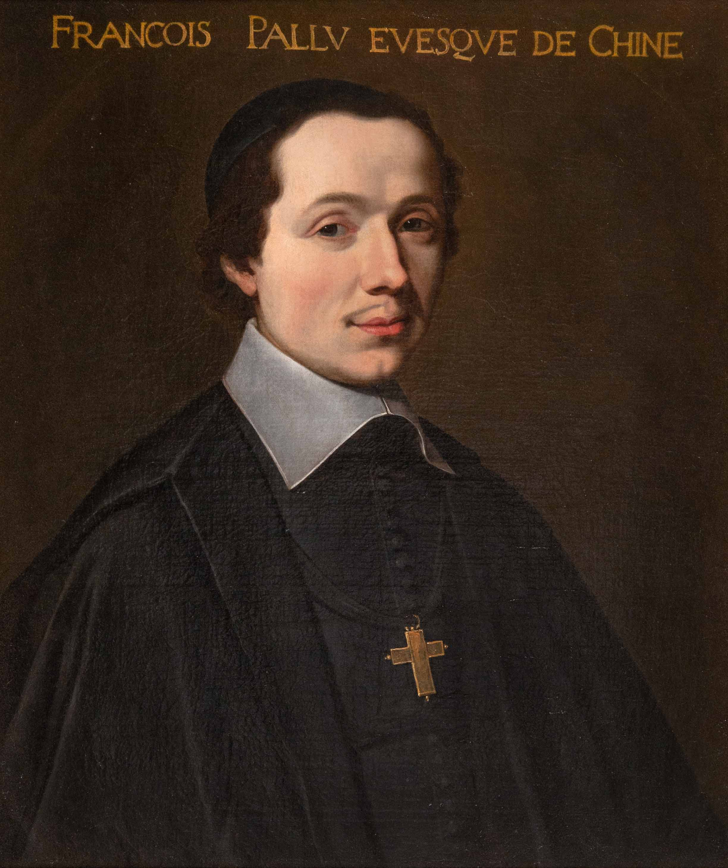 Mgr François Pallu, évêque de Chine